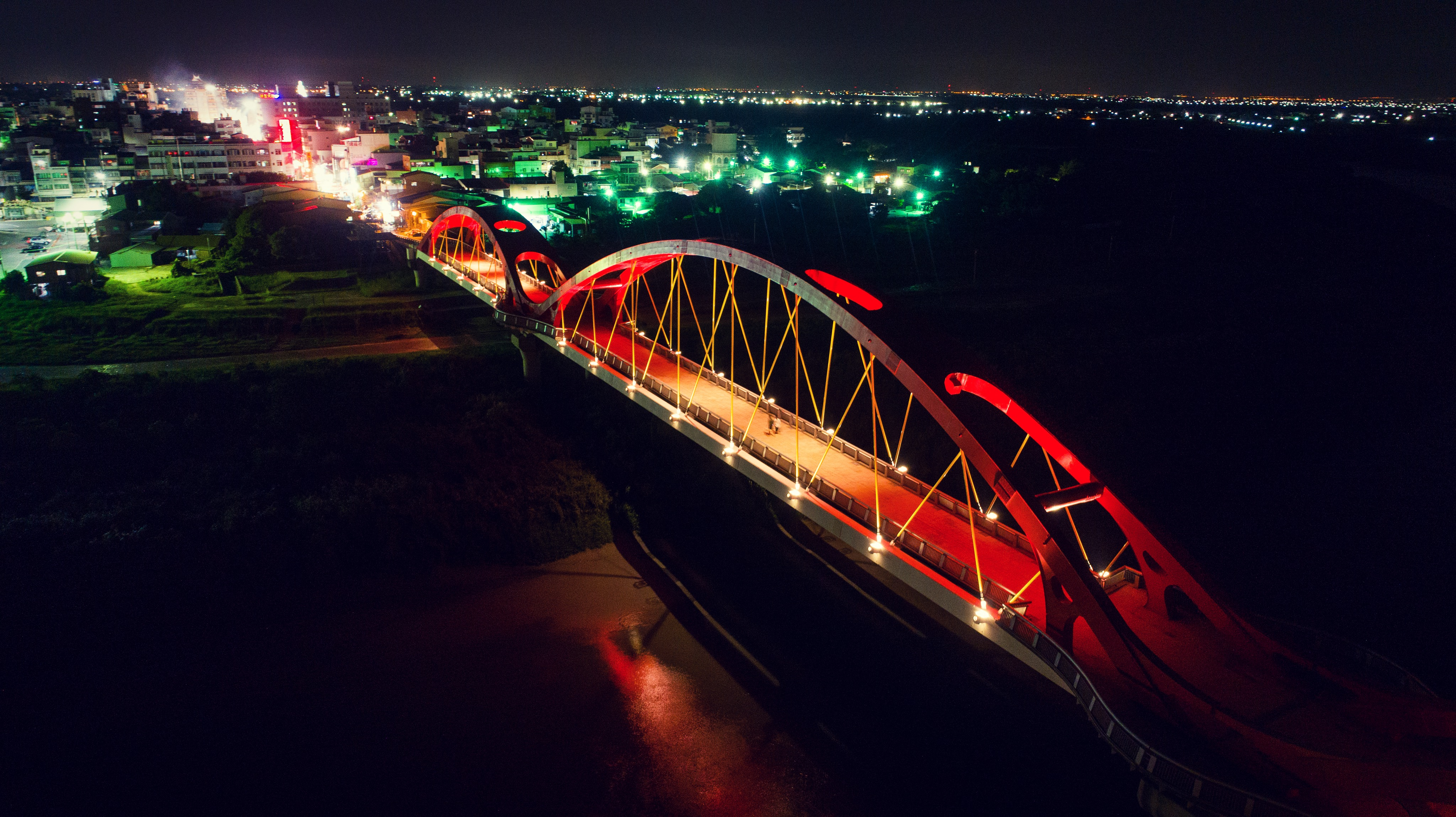 中文（台灣）: 北港觀光大橋 夜景